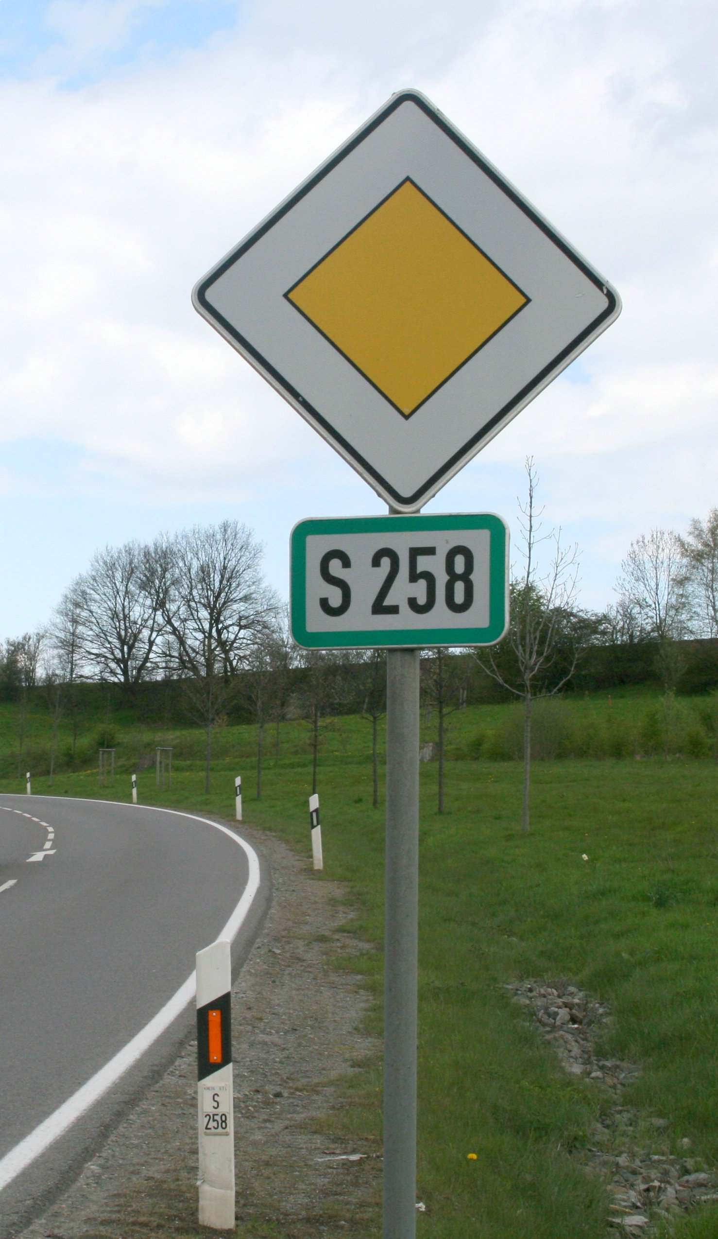 Ausschilderung der Staatsstraße 258 bei Zwönitz